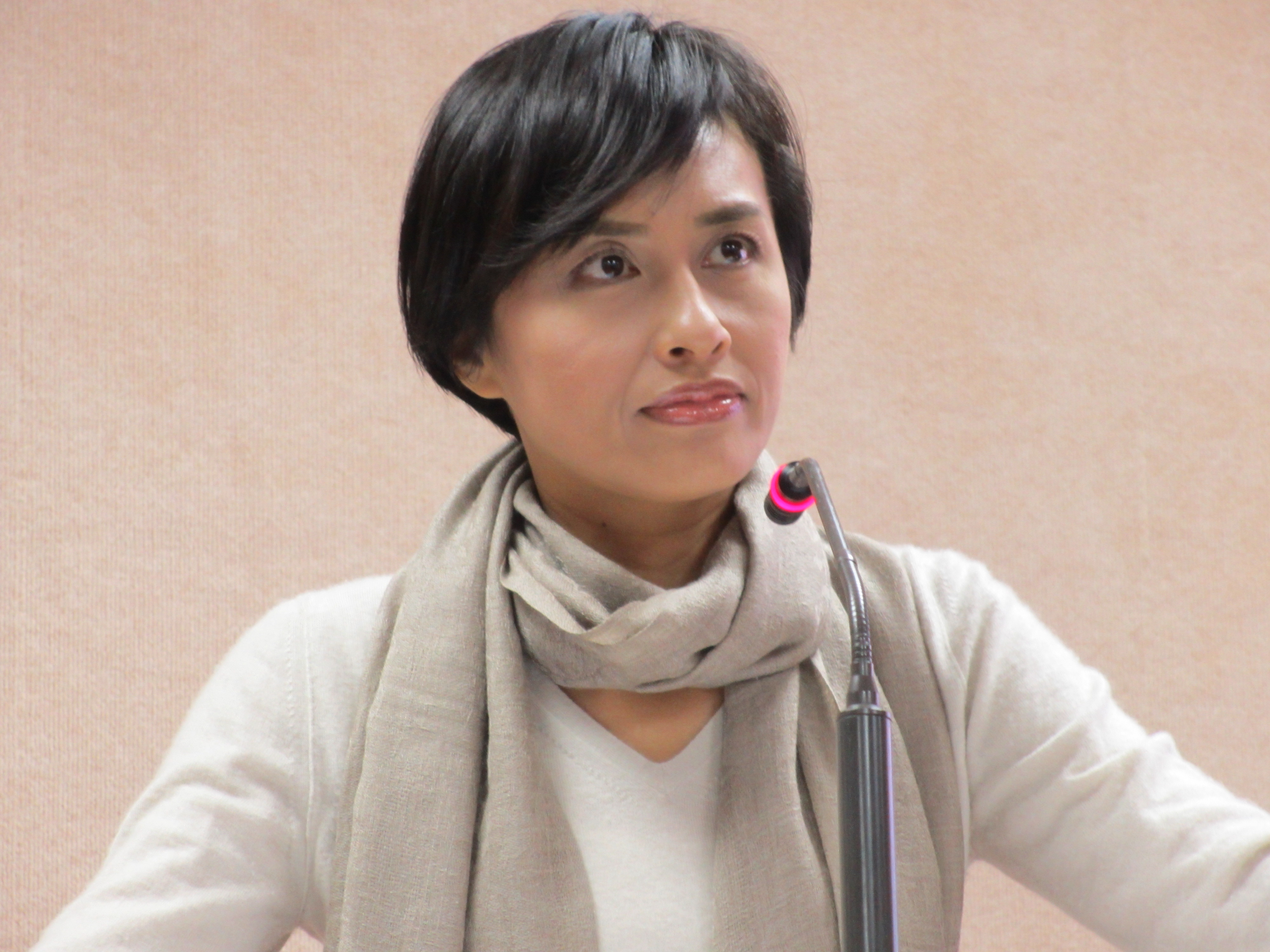 民主進步黨籍立法委員邱議瑩